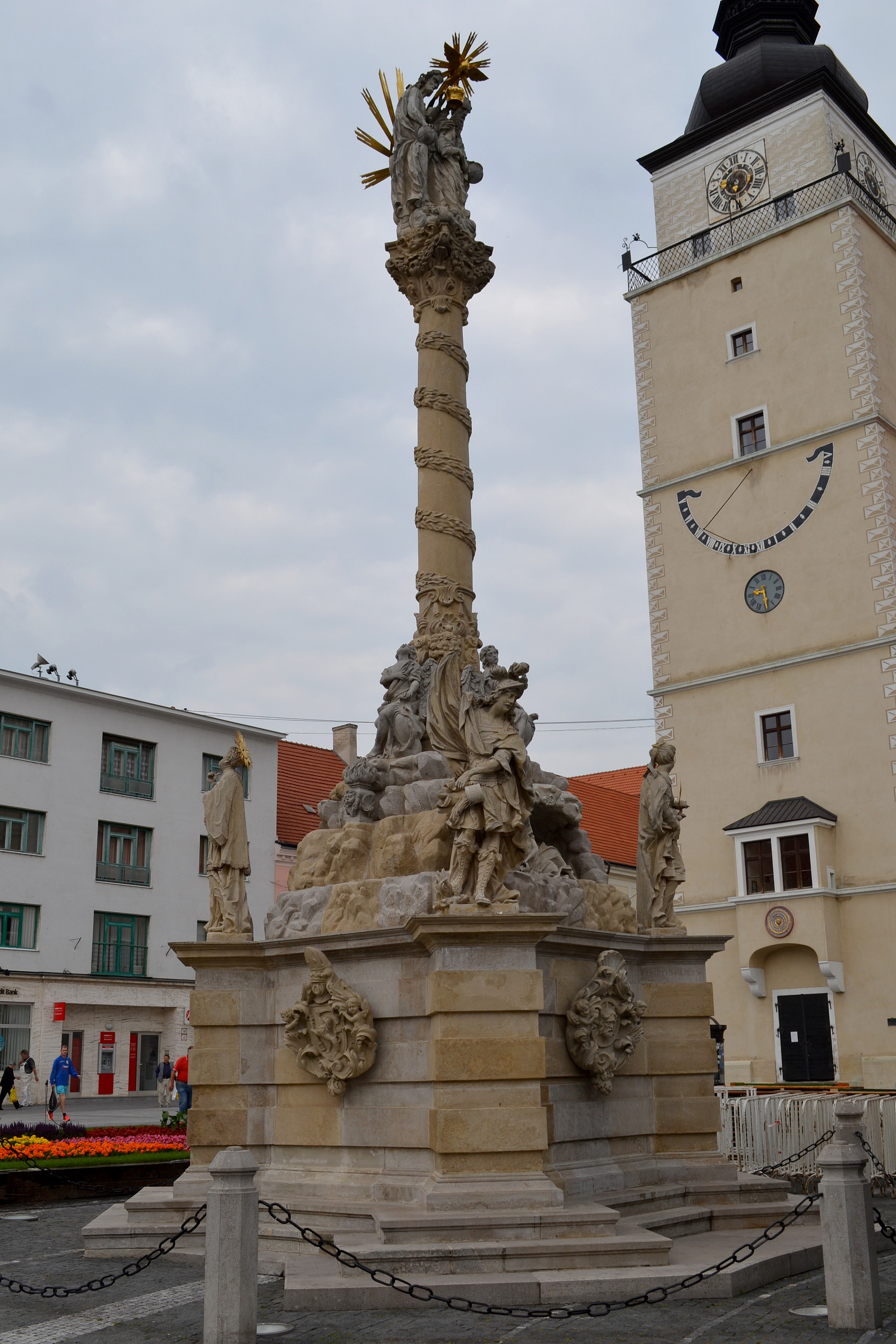 Trojičný stĺp - celkový pohľad